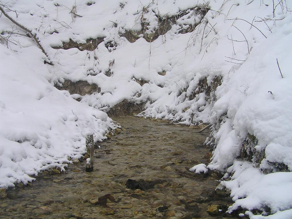 Źródło rzeki Wyżnica w miejscowości Słodków Trzeci.